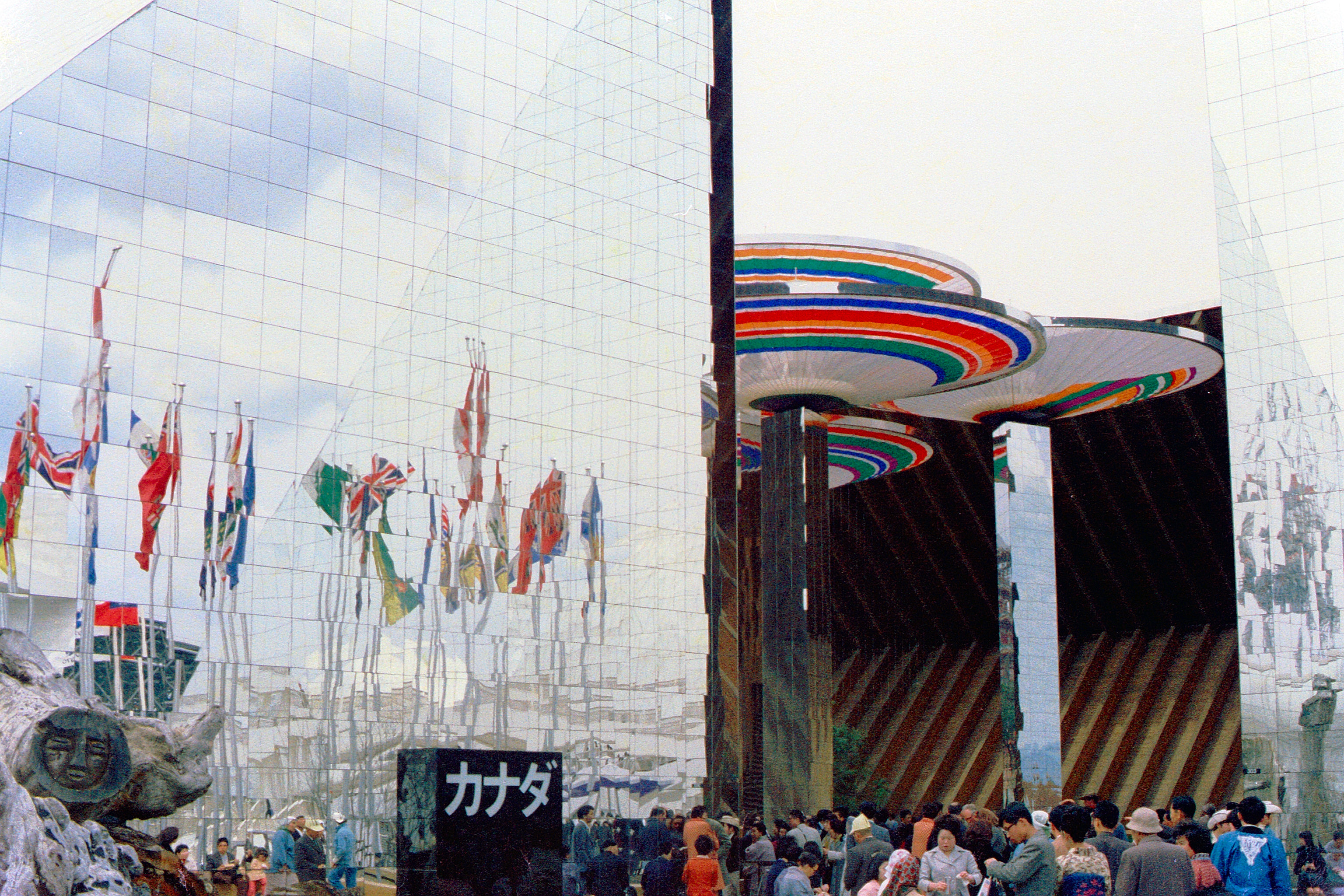 Canadian Pavilion.jpg, Osaka Expo'70. April 1970